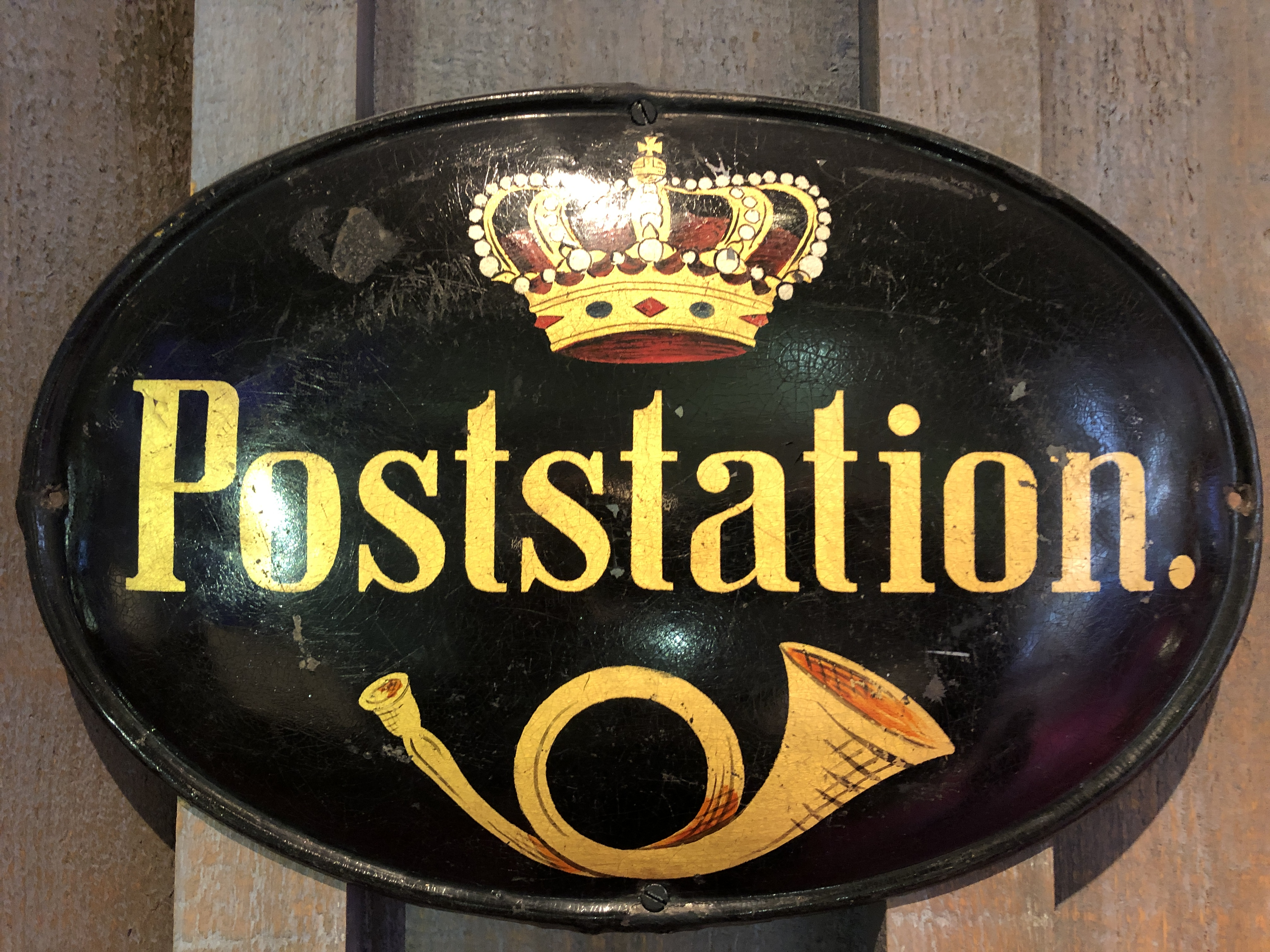 Poststation - skylt Postmuseum